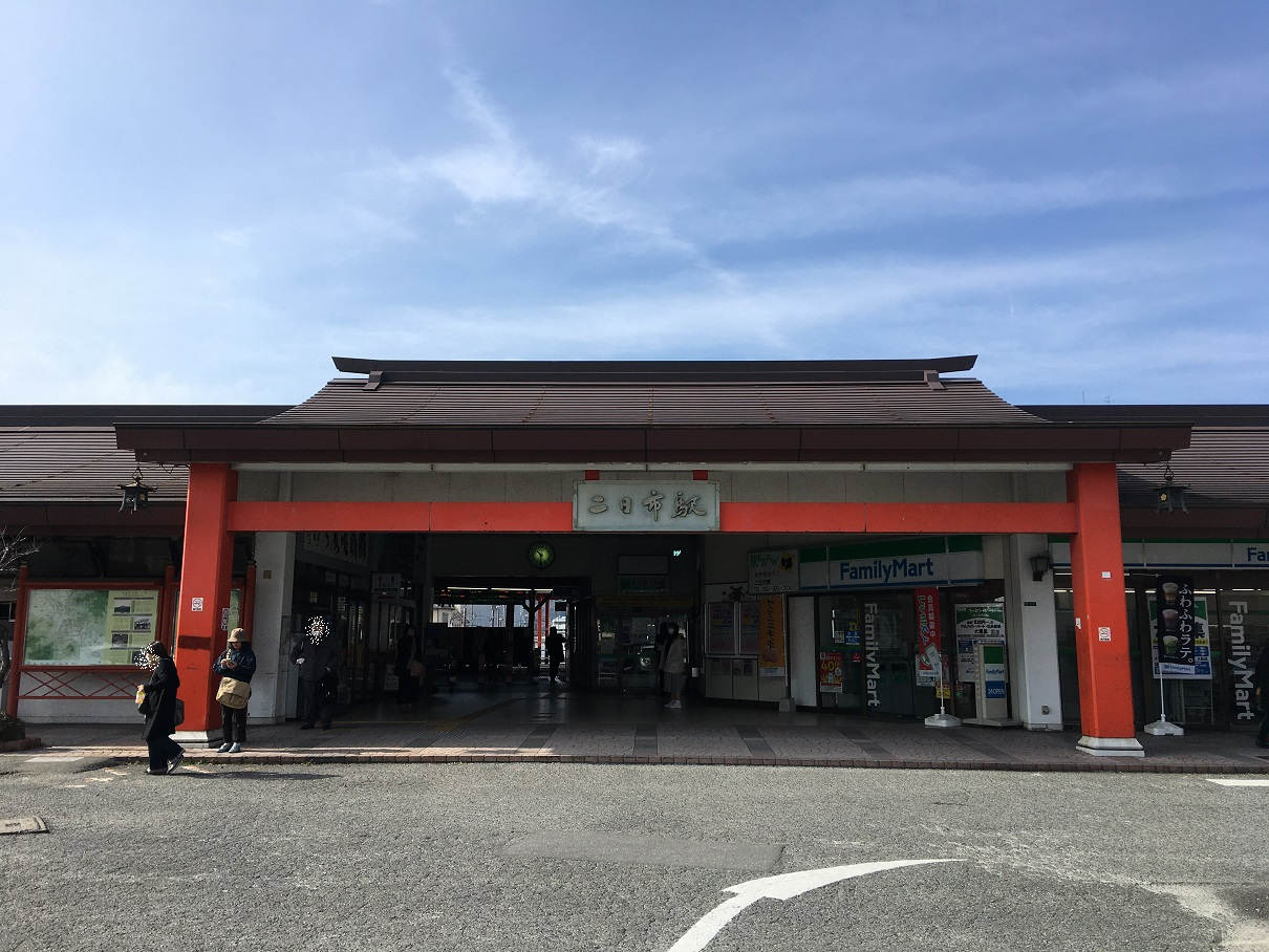 JR二日市駅舎